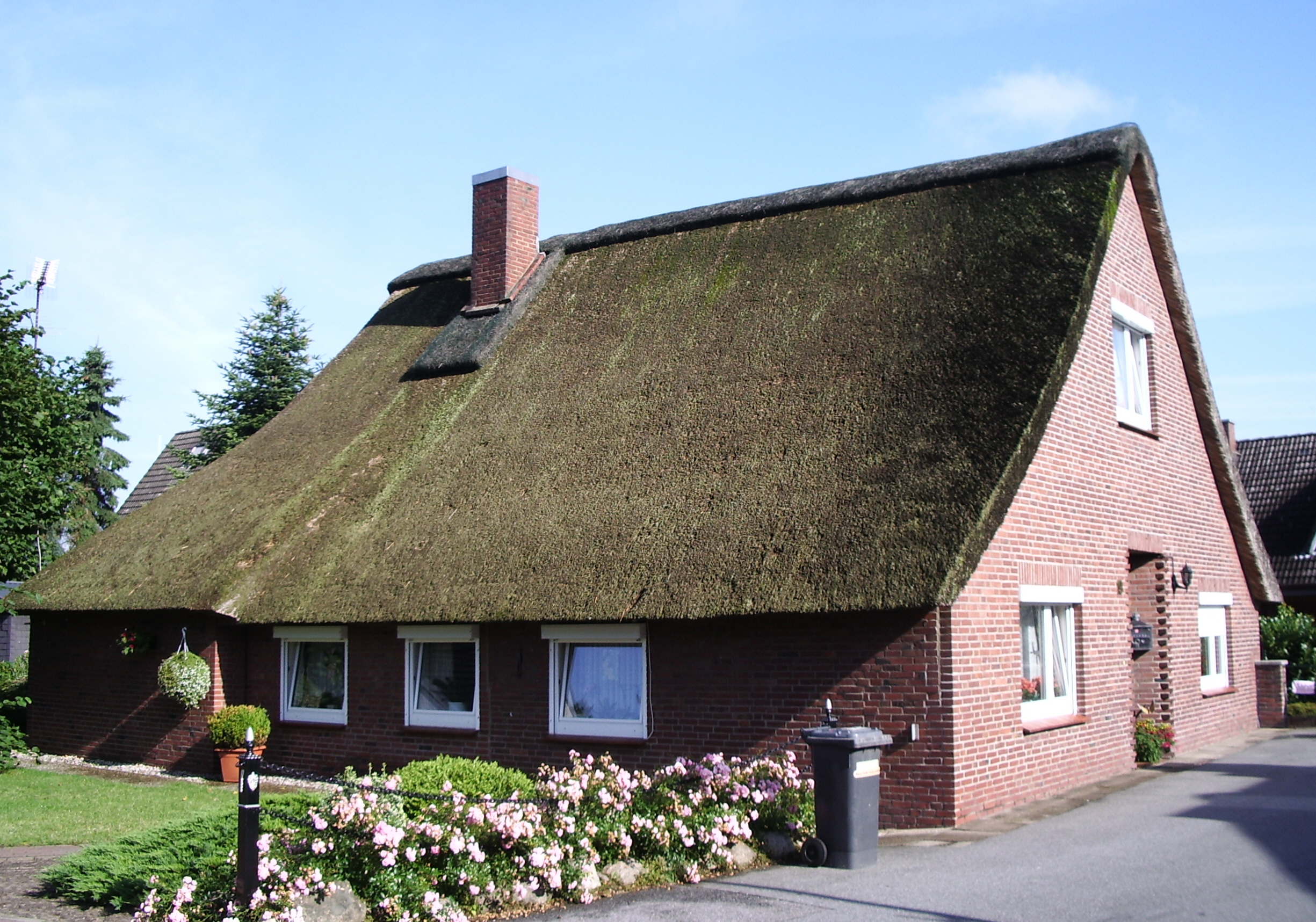 Ein über 200 Jahre altes Haus in Hetlingen